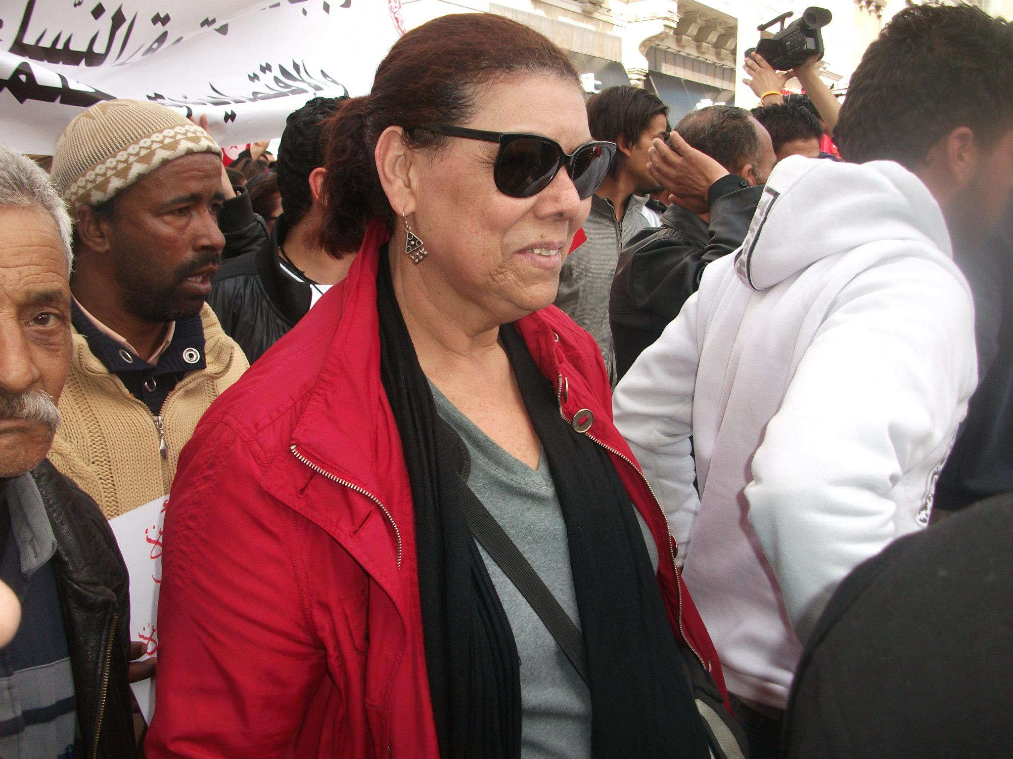 Noura Borsali lors d'une manifestation contre la violence politique. Tunis, le 9 Mars 2013